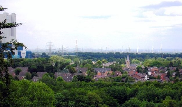 Blick von der Wiedenfelder Höhe auf Niederaußem im Sommer 2009